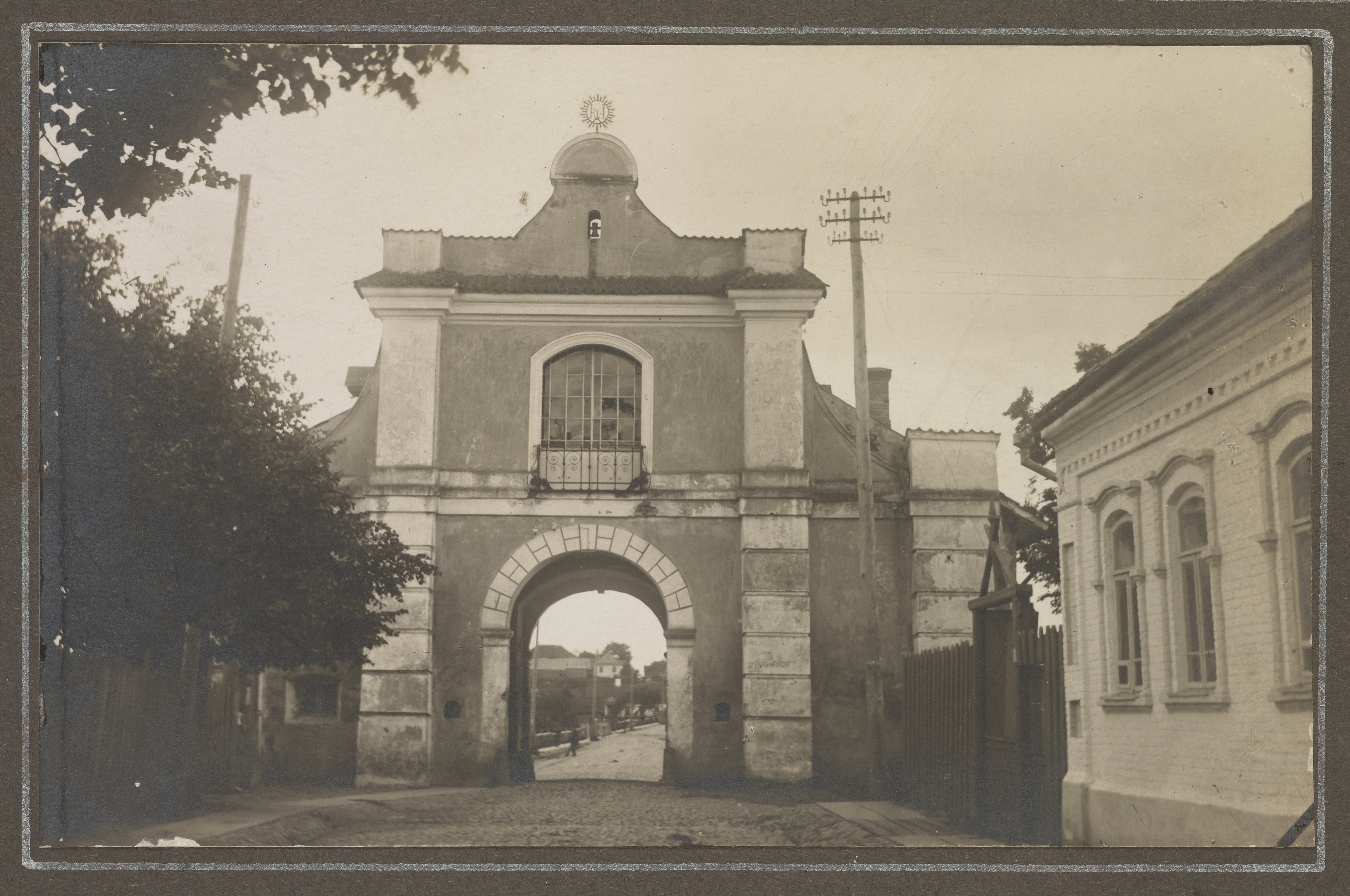 Беларуская (тарашкевіца): Нясьвіж (Niaśviž), Слуцкая брама (Słuckaja brama)